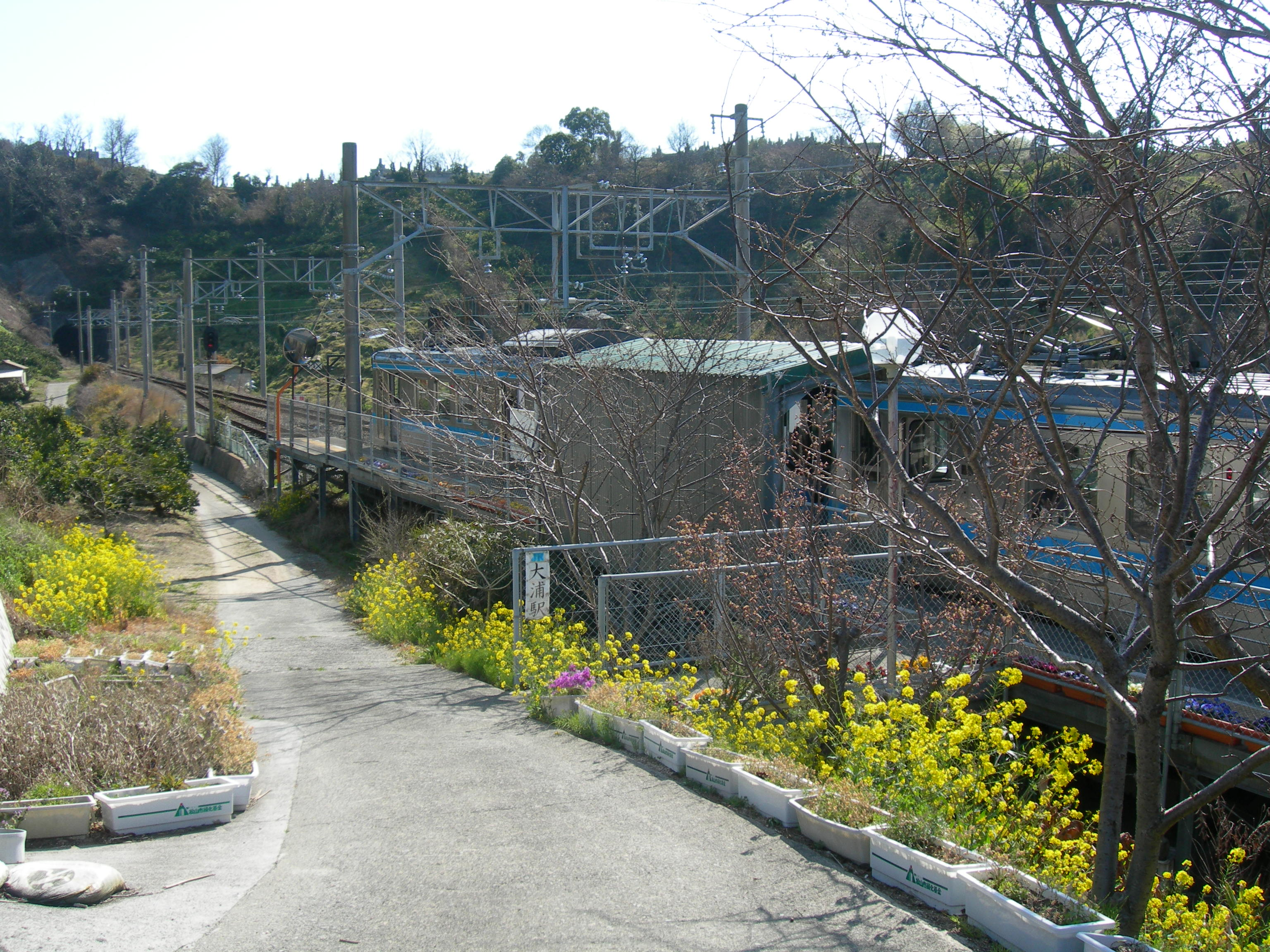 大浦駅